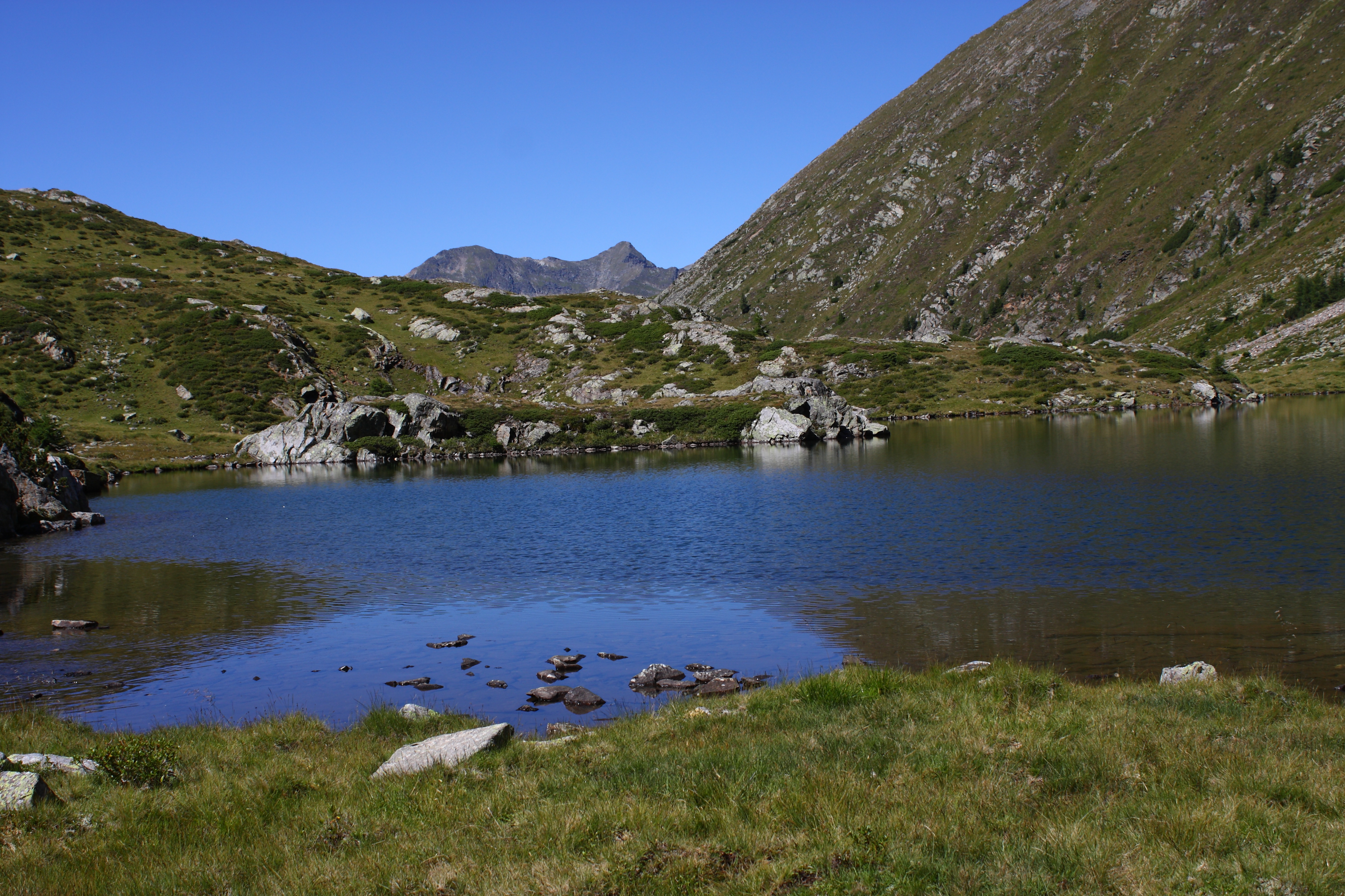 Lindlsee, Lungau, Salzburg, Österreich